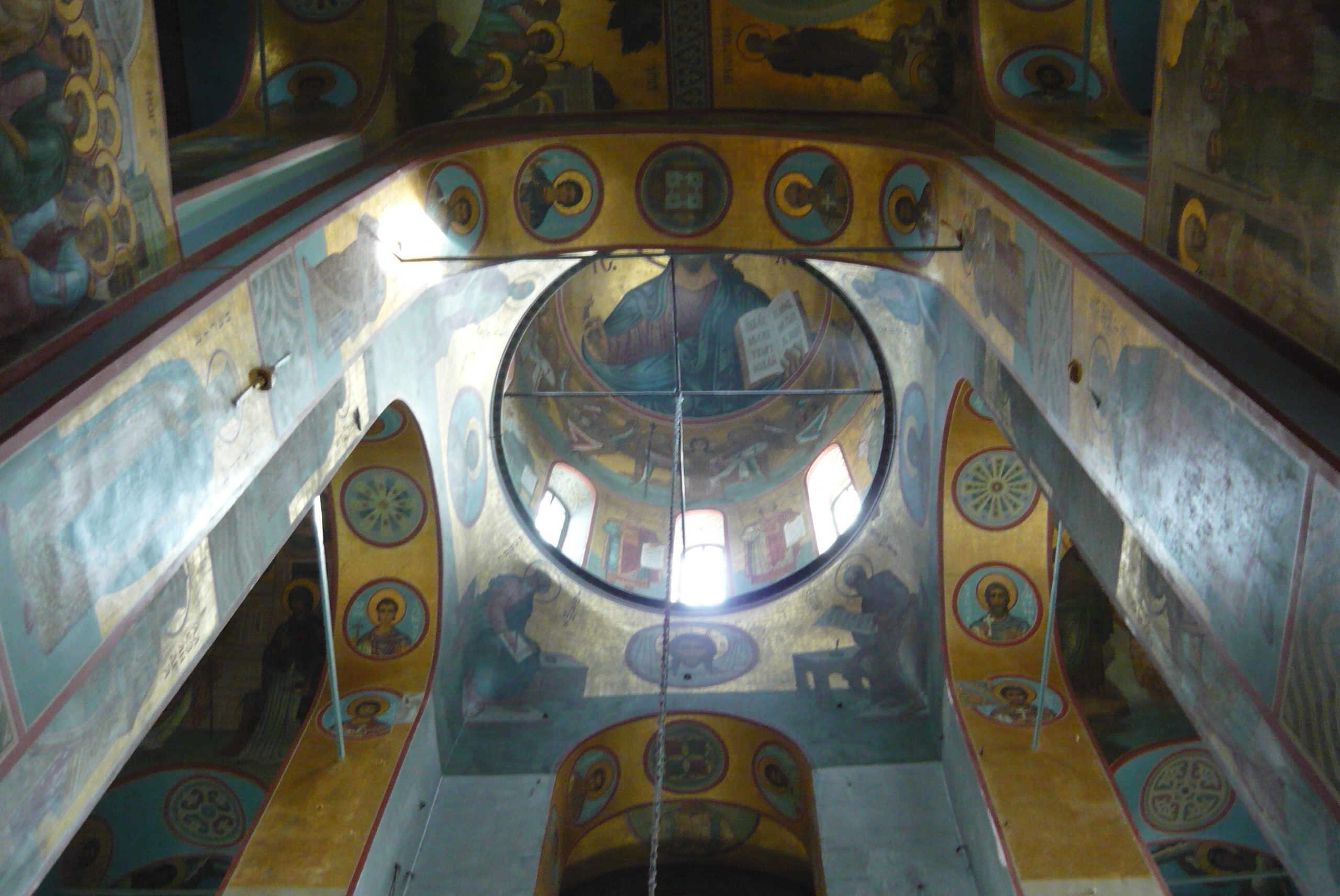 Георгиевкий собор Юрьева монастыря. Великий Новгород